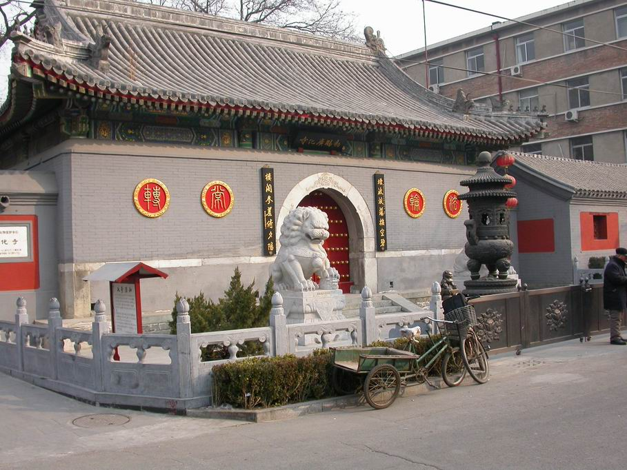 广化寺山门，自拍，本图片不允许百度百科使用